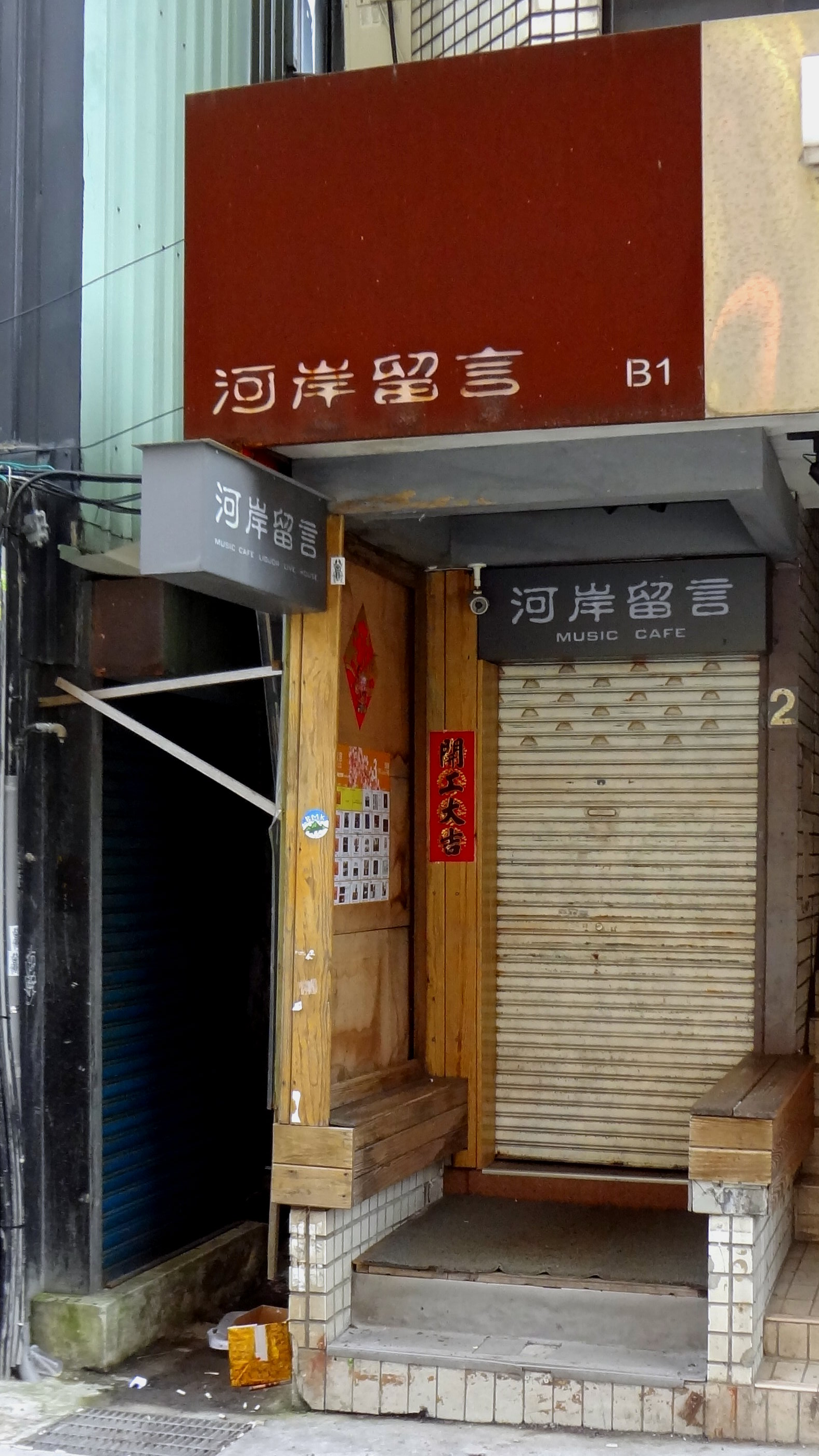 河岸留言音樂藝文咖啡，位於臺北市中正區羅斯福路三段244巷2號地下1樓，拍攝時未營業。